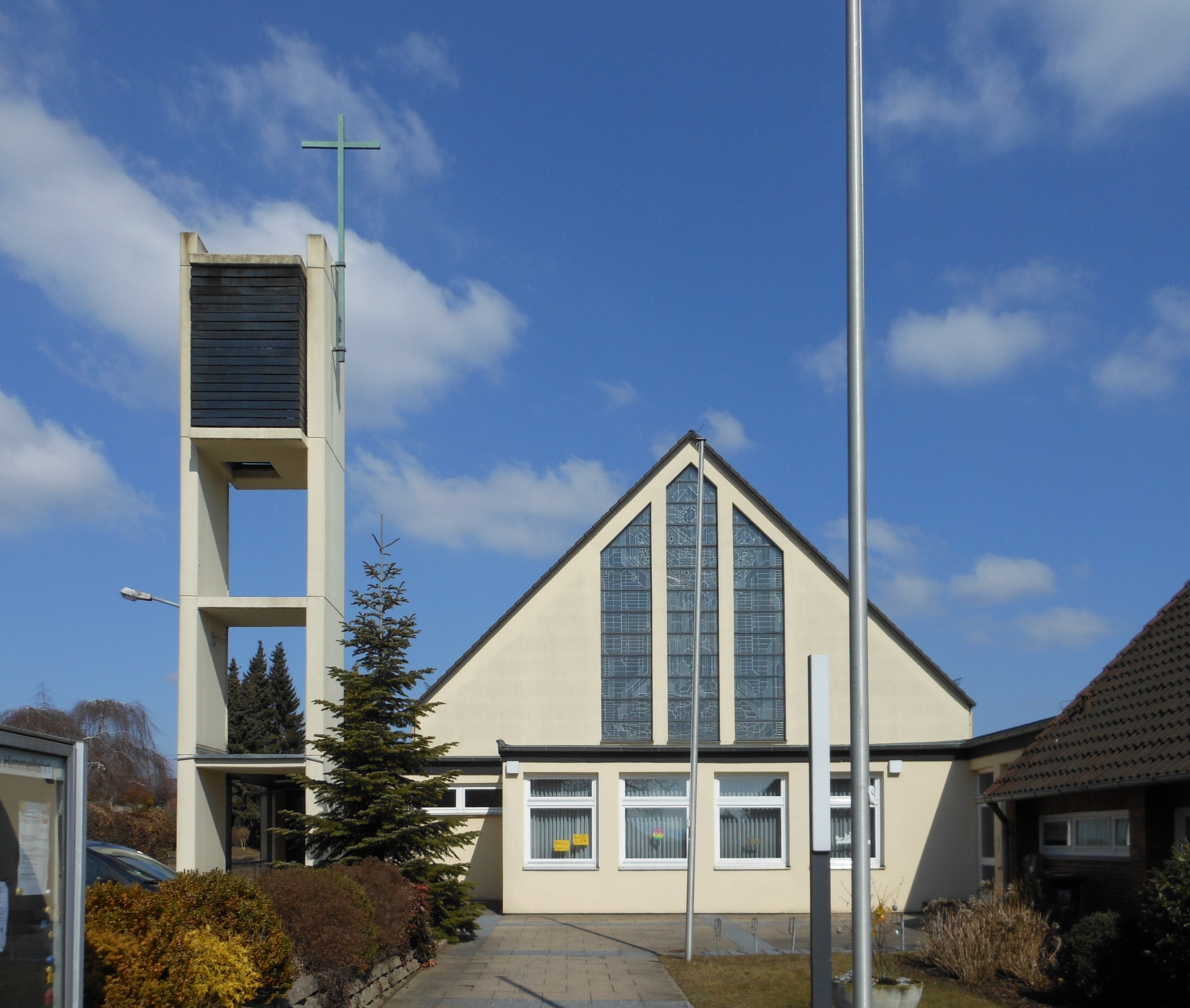 Rodenberg, kath. Kirche Mariä Himmelfahrt